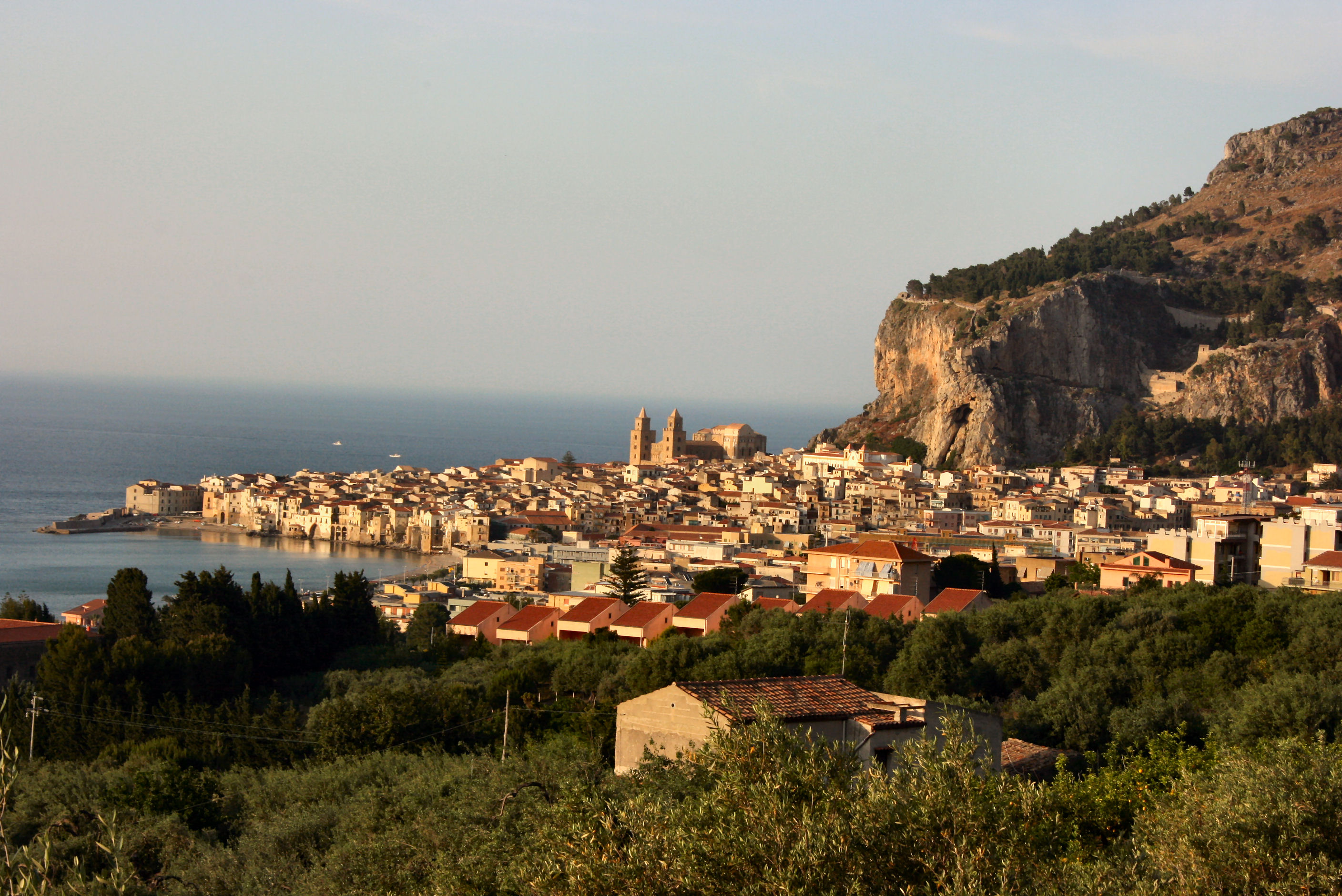 Blick auf Cefalu